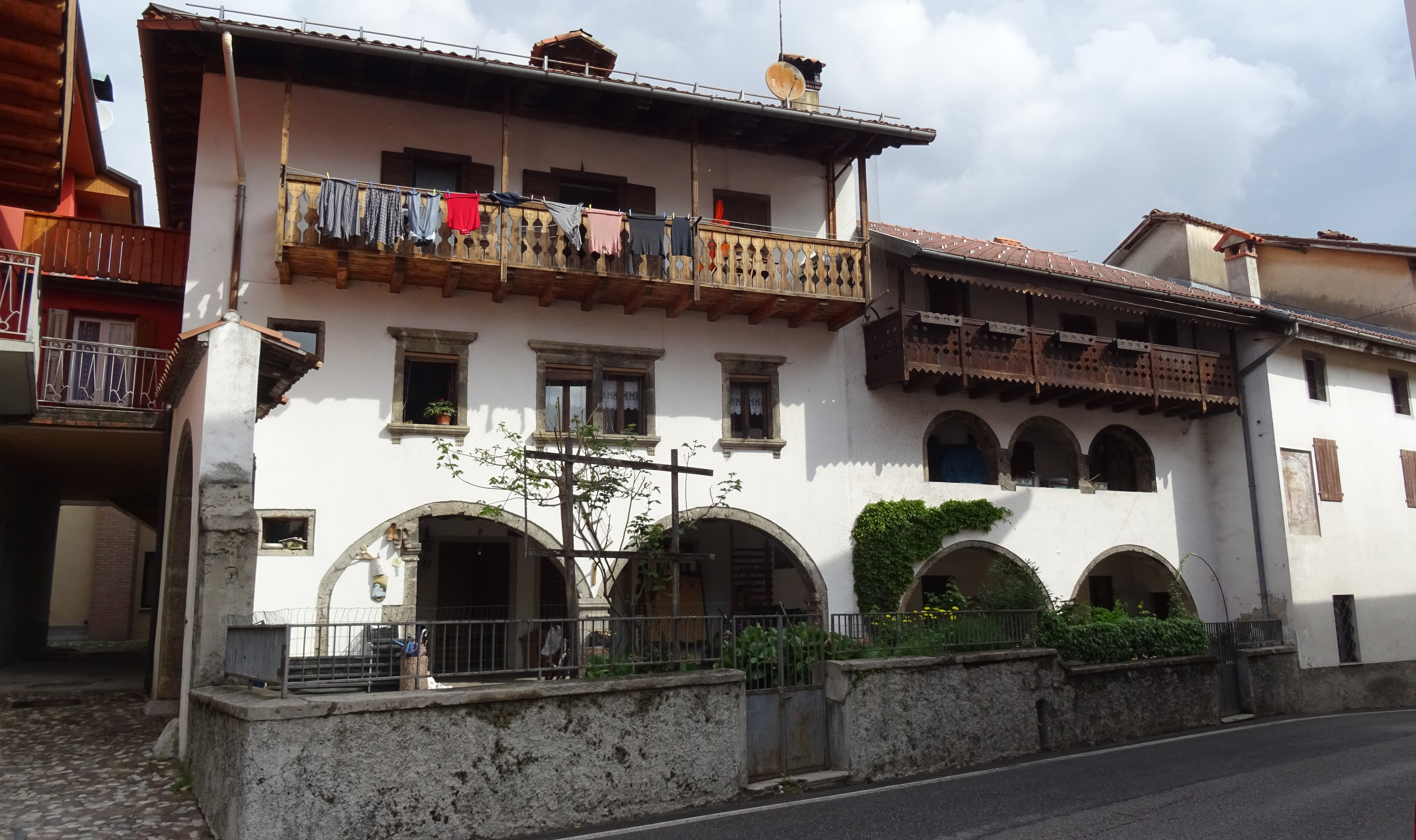 Via Nazionale, casa di Serbia e casa Candotti